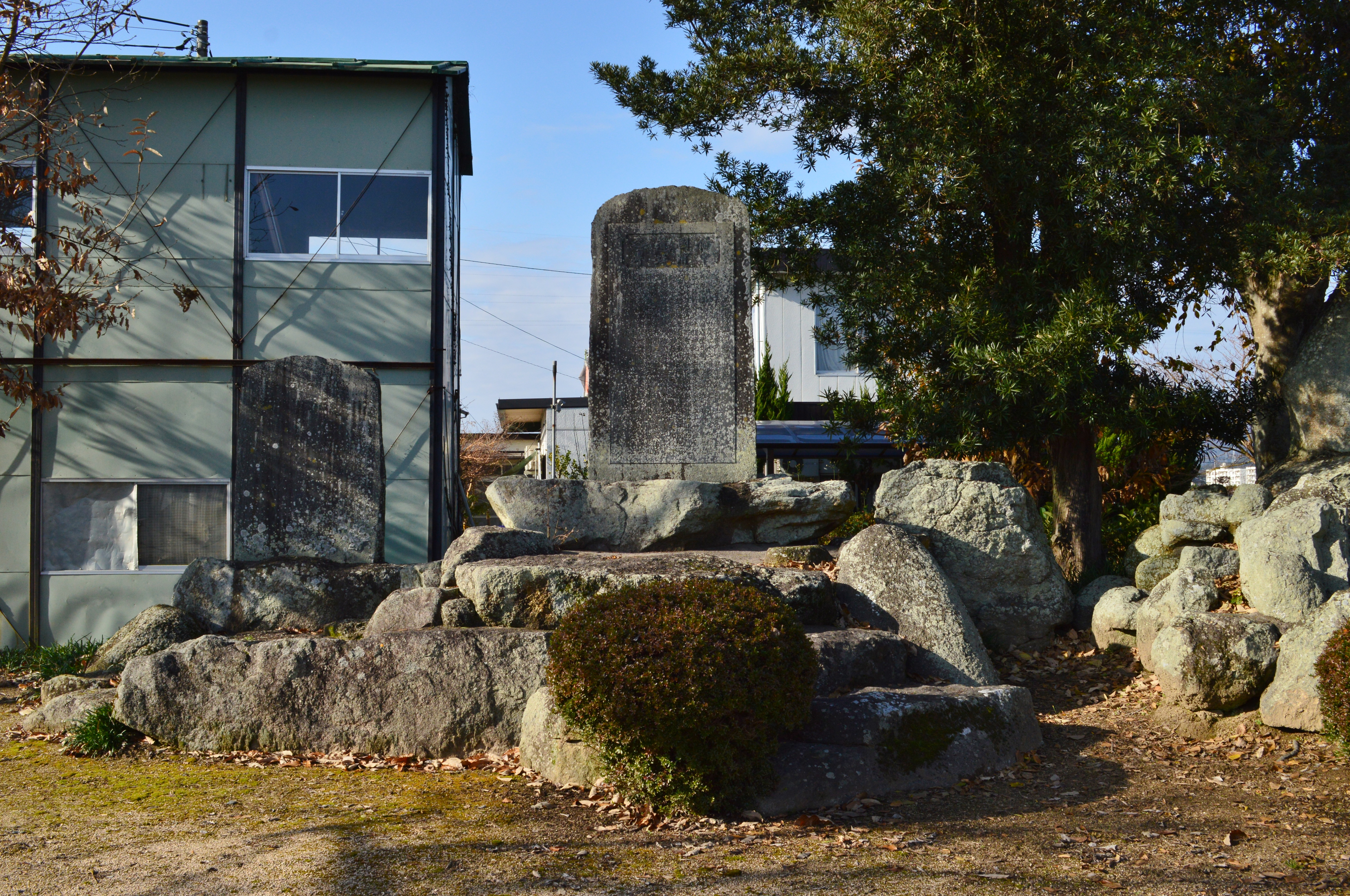 伝備中国府跡 石碑